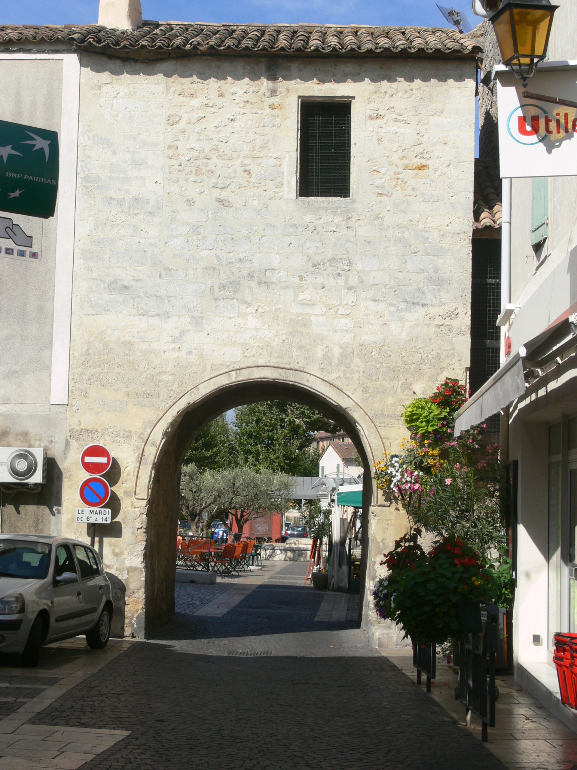 Saint-Paul-Trois-Châteaux - porte Notre-Dame, depuis la ville (intérieur)